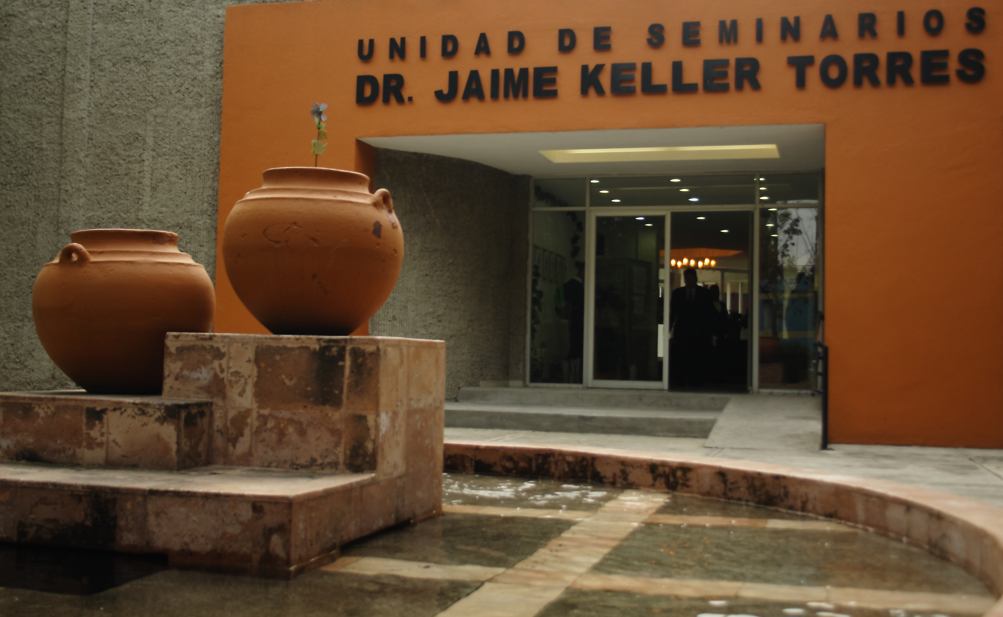 Unidad de seminarios de la FESC.